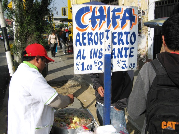 Chifa al paso a un sol. Avenida 28 de julio a la altura de Vía Expresa, Lima, Perú